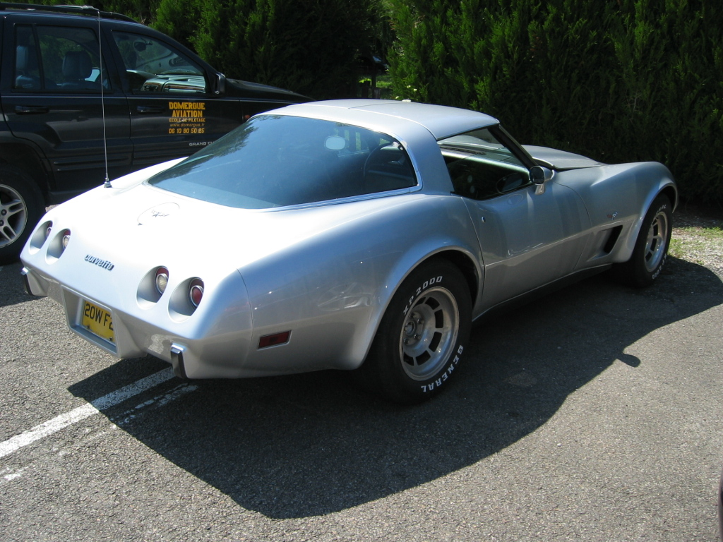 Chevrolet Corvette C3